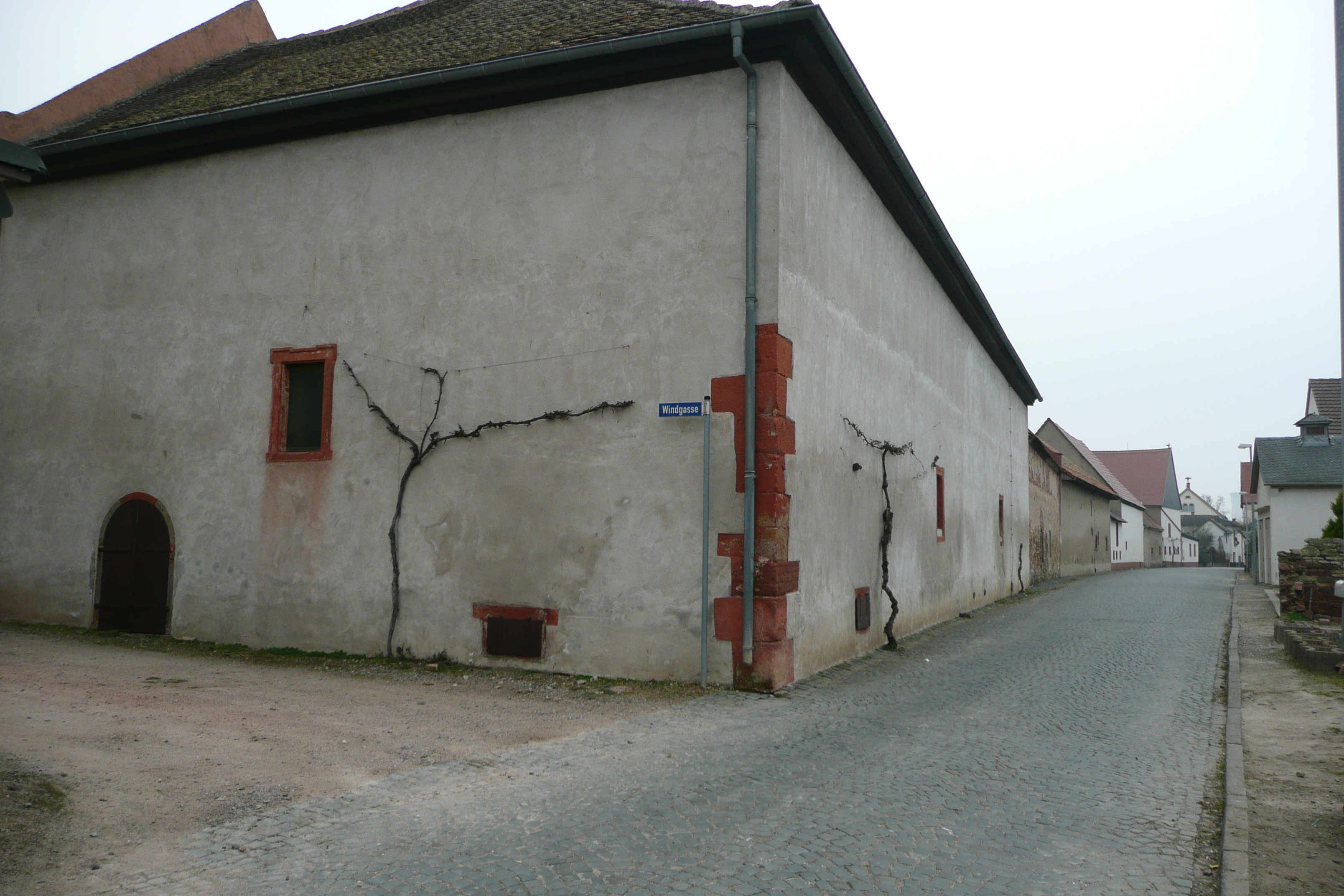 Dorfbefestigung_an_der_Nordwest-Ecke, Windgasse/Killenfeldstr..JPG